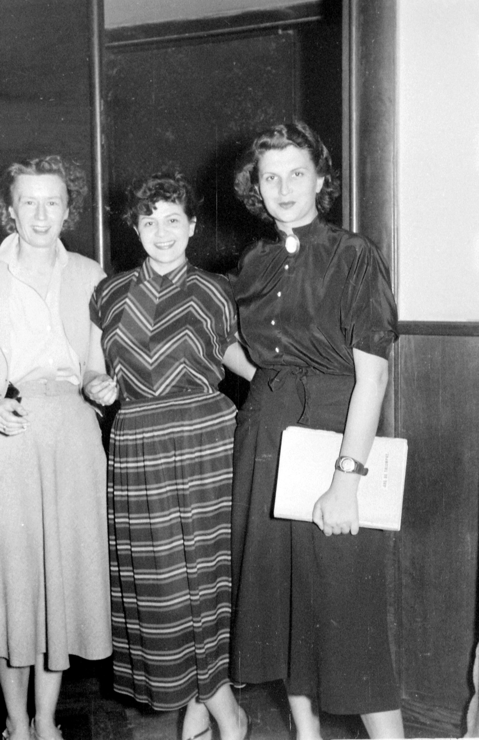 Вера Шеган, Мира Ступица, Мира Траиловић, снимање драме у Радио Београду, педесетих година 20. века. фото Стеван Крагујевић (по одобрењу кћерке Тање Крагујевић)